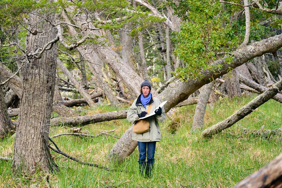 Aude Picault, Patagonie,Dessin,Nature